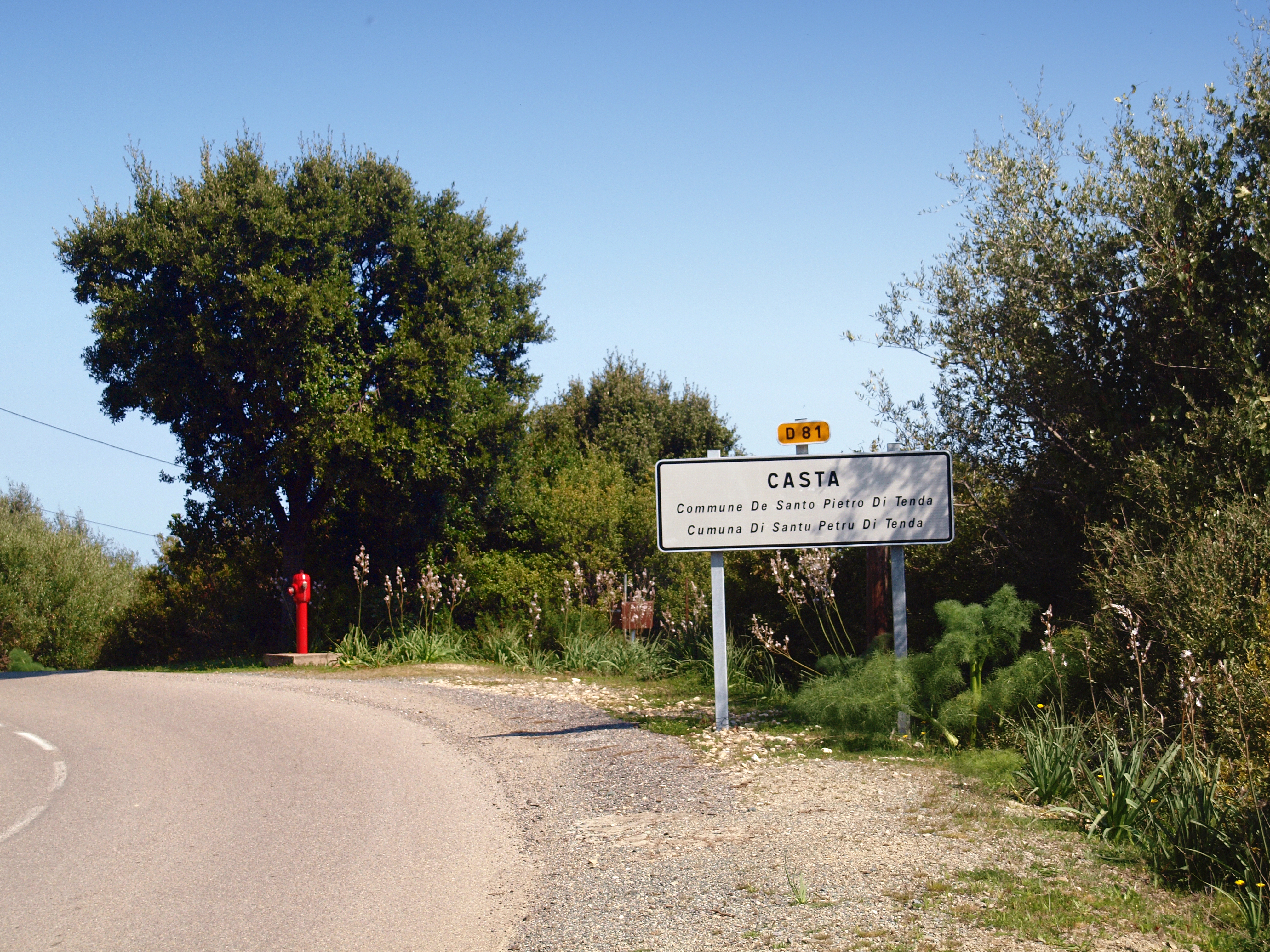 Santo-Pietro-di-Tenda (Corsica) - Panneau routier Casta